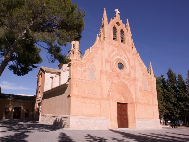 Santuario de la Virgen de Gracia (Caudete)